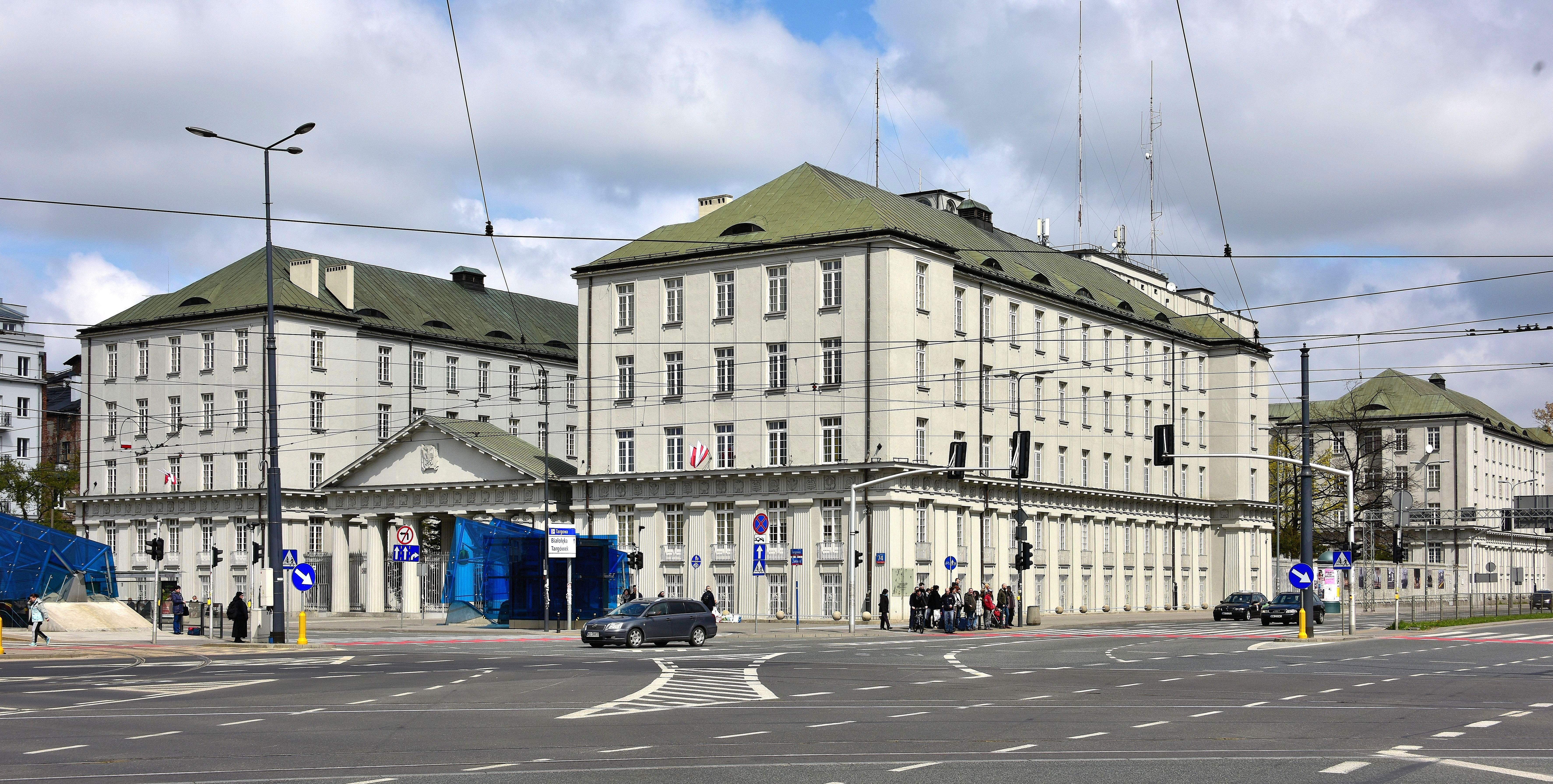 Budynek Dyrekcji Kolei Państwowych przy ul. Targowej w Warszawie